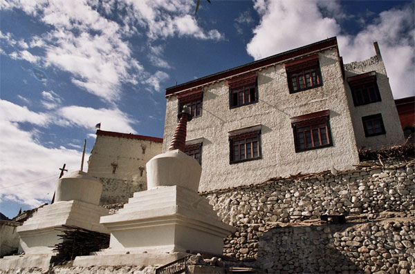 Phyang Gompa, Ladakh, India